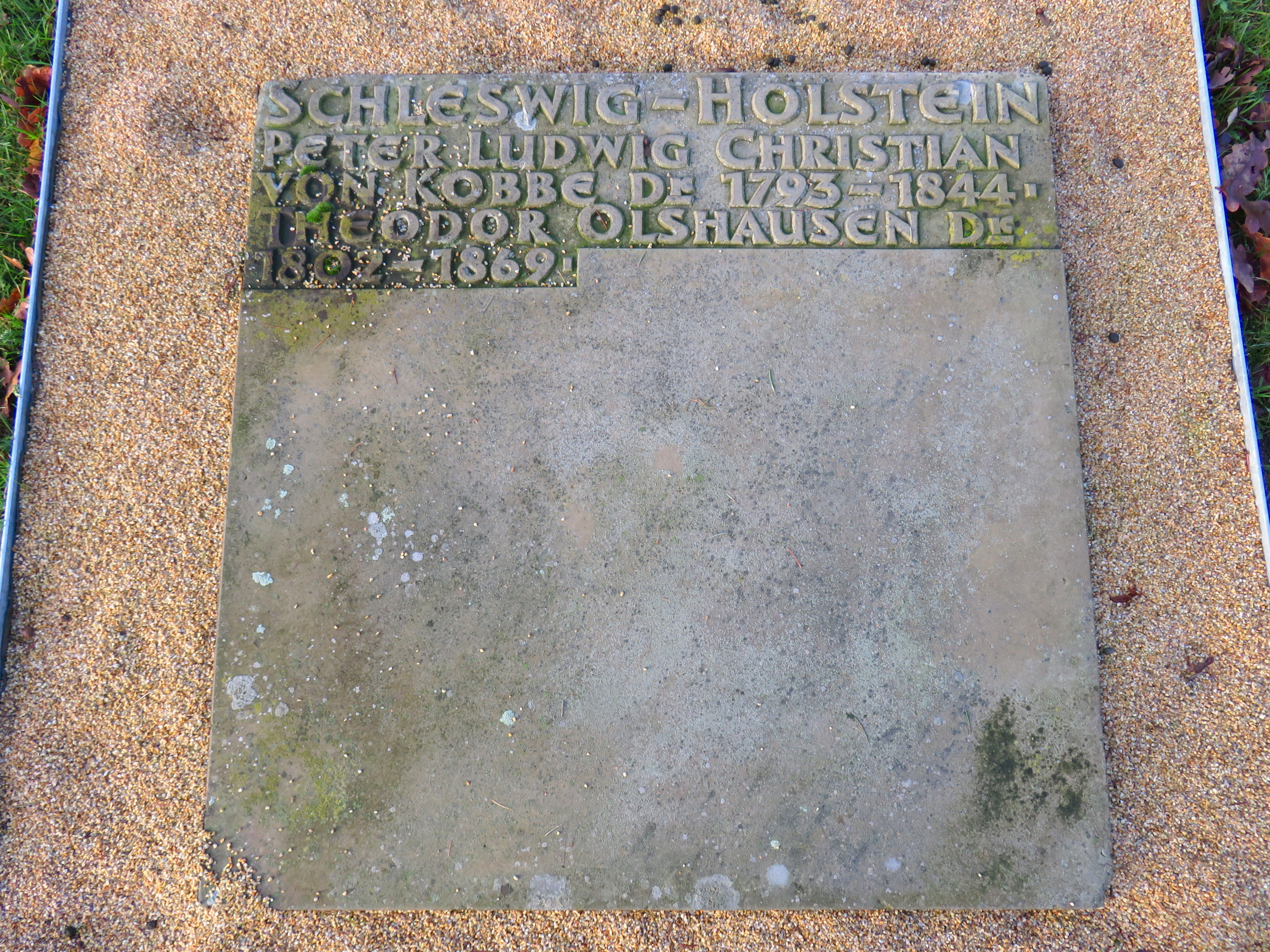 Sammelgrabmal Schleswig-Holstein im Bereich des Althamburgischen Gedächtnisfriedhofs auf dem Hamburger Friedhof Ohlsdorf zu Ehren von unter anderen Peter von Kobbe, Theodor Olshausen.